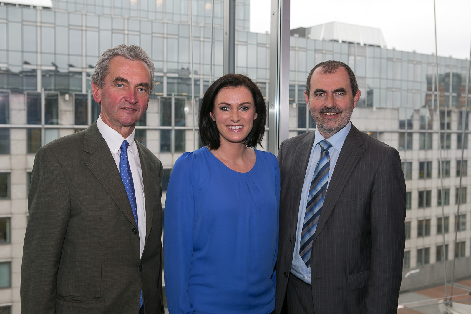 Elisabeth Köstinger ist heute Gastgeberin einer Diskussionsveranstaltung, die sie gemeinsam mit dem Präsidenten des Dachverbands Erneuerbare Energie Österreichs, Josef Plank, im Europäischen Parlament veranstaltet. Thema der Debatte mit Abgeordneten aller Fraktionen sind die Auswirkungen der geplanten Energiewende in Europa. Österreich zählt hier zu den Vorreitern in Europa. Unser Knowhow kann zum Erolg der geplanten europäischen Energieunion beitragen, betont Köstinger, Umweltsprecherin im EU- Parlament.